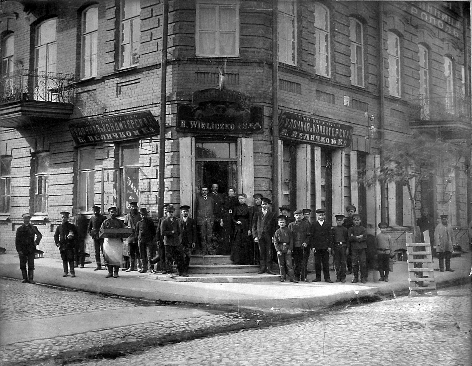 Беларуская (тарашкевіца): Магілёў (Mahiloŭ), рог вуліцы Шклоўскай (vulica Škłoŭskaja) і завулку Пажарнага (zavułak Pažarny). Гасьцініца Мэтраполь